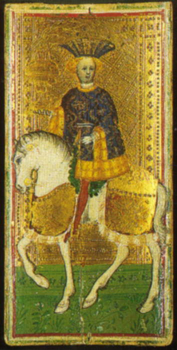 Cavaliere di coppe